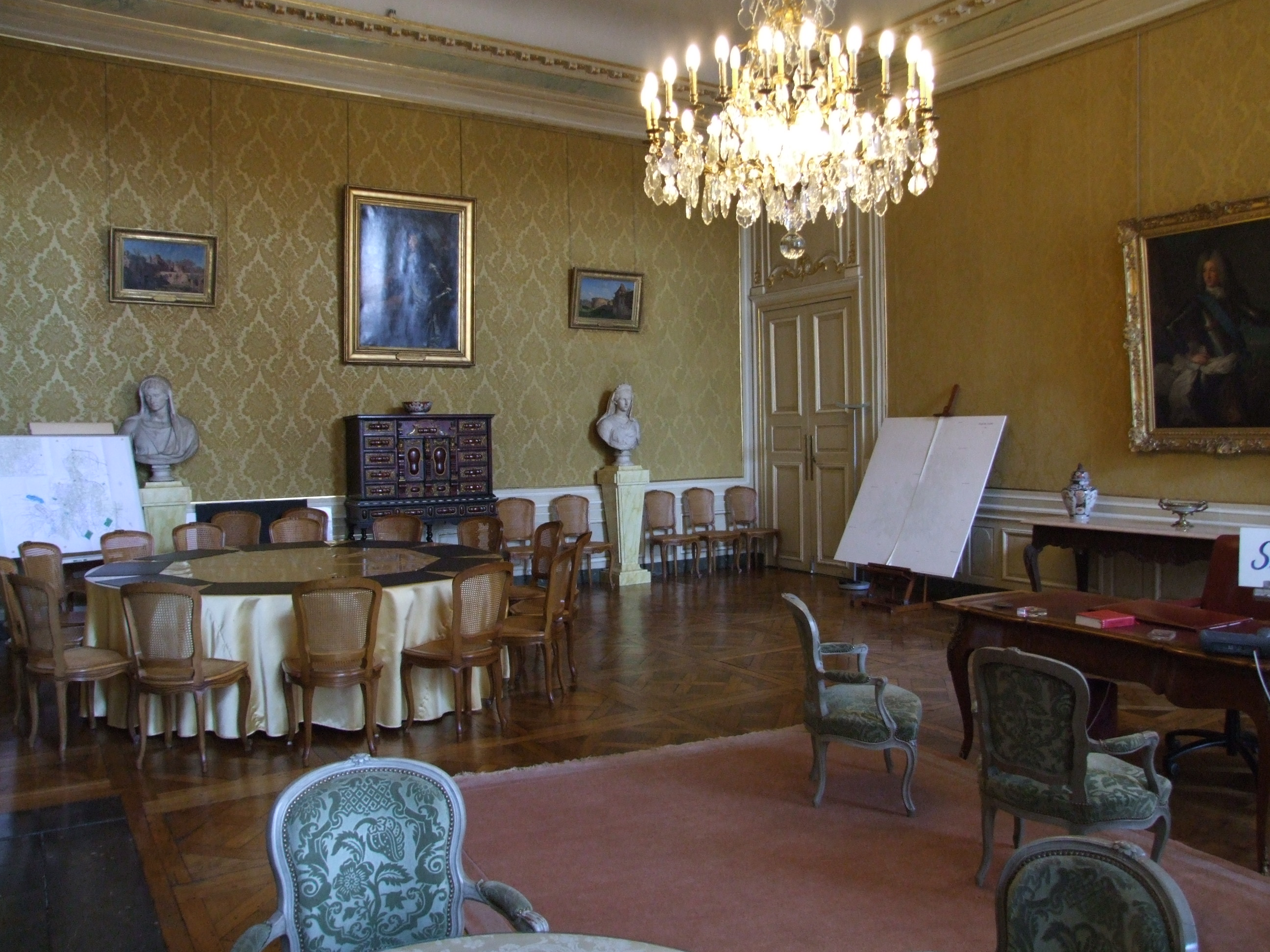 Hôtel de ville, salon, Dijon, Côte-d'Or, Bourgogne, FRANCE